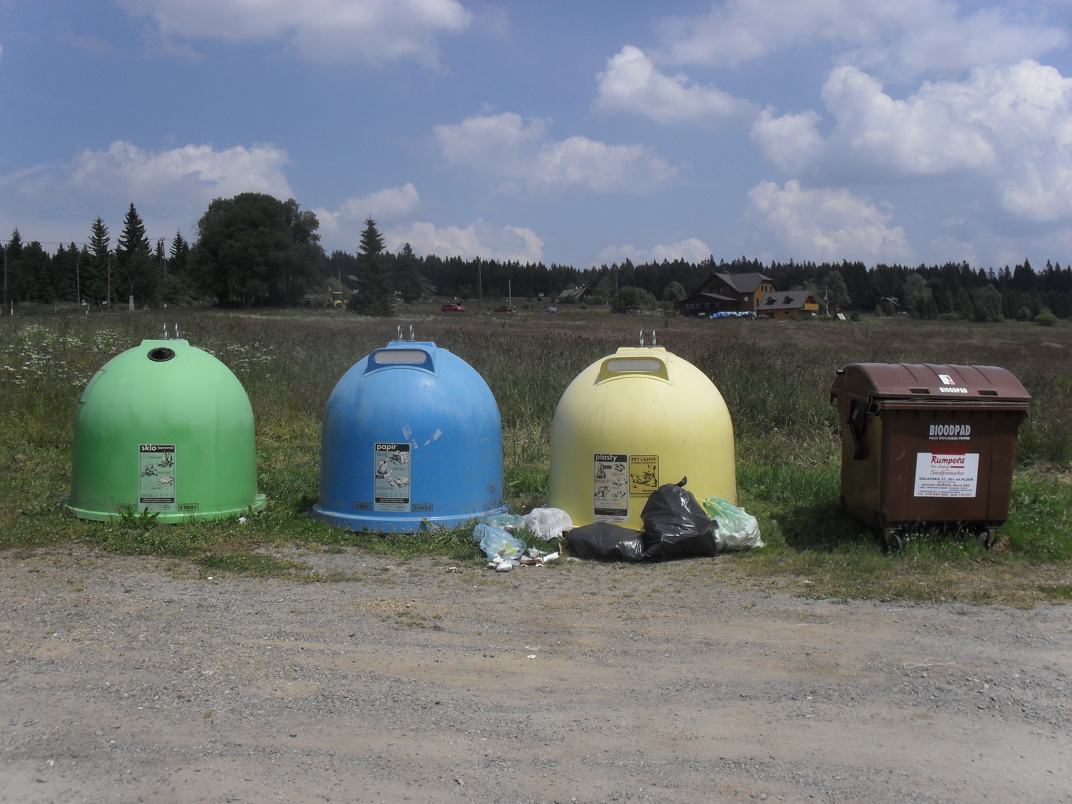 Zelený - sklo, modrý - papír, žlutý - plast a hnědý - bioodpad. Starší typy kontejnerů na tříděný odpad, používané na Filipově huťi, na Šumavě.